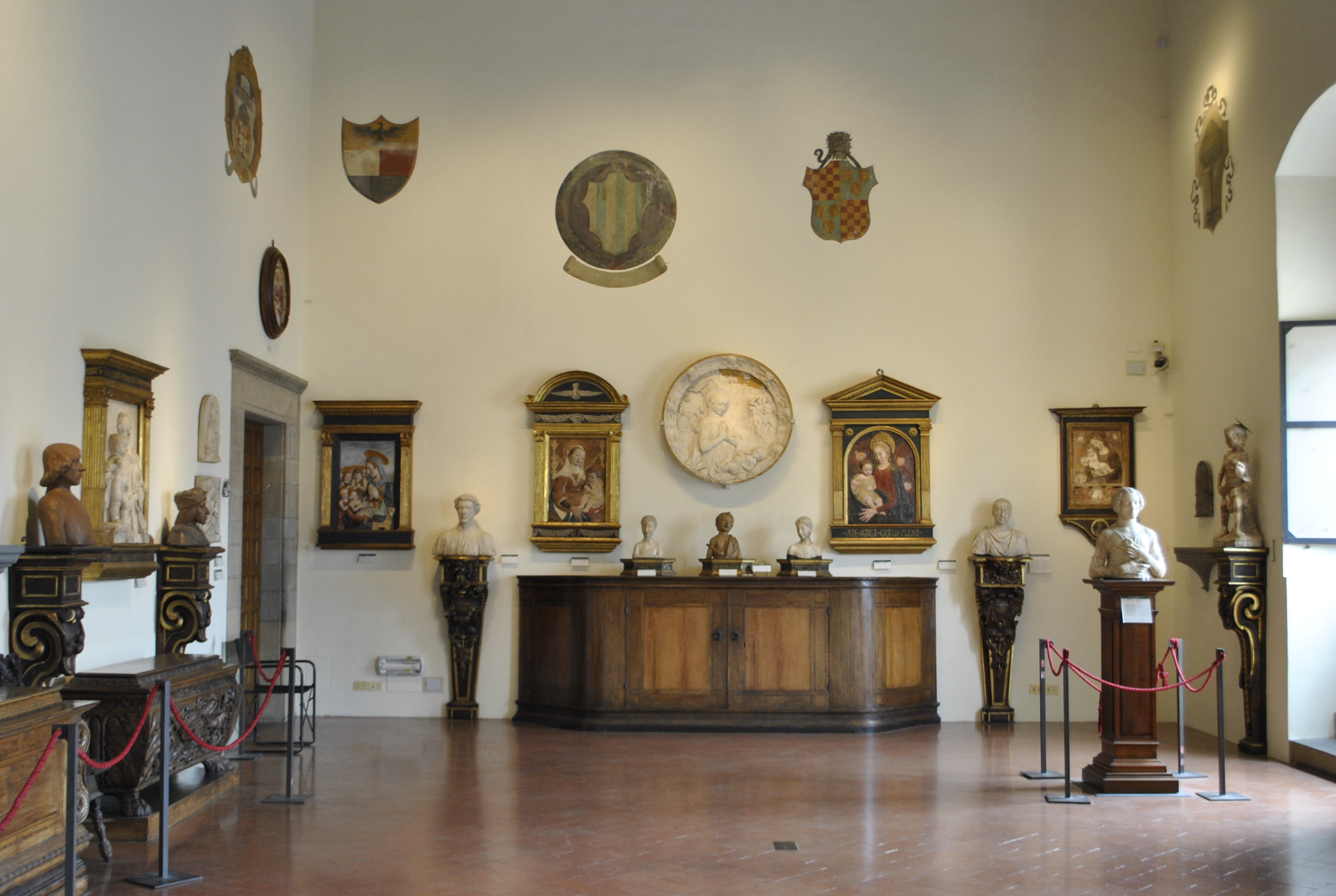 Sala del Verrocchio e della scultura del secondo Quattrocento, museo nazionale del Bargello, Firenze